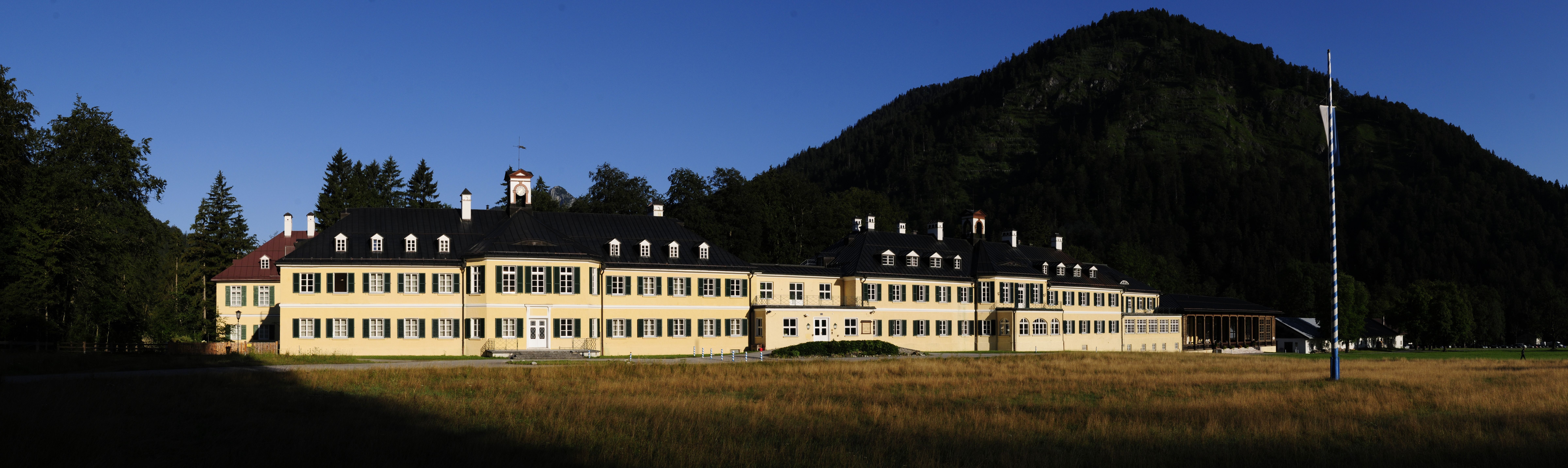 Ostpanorama des Tagungszentrums Wildbad Kreuth